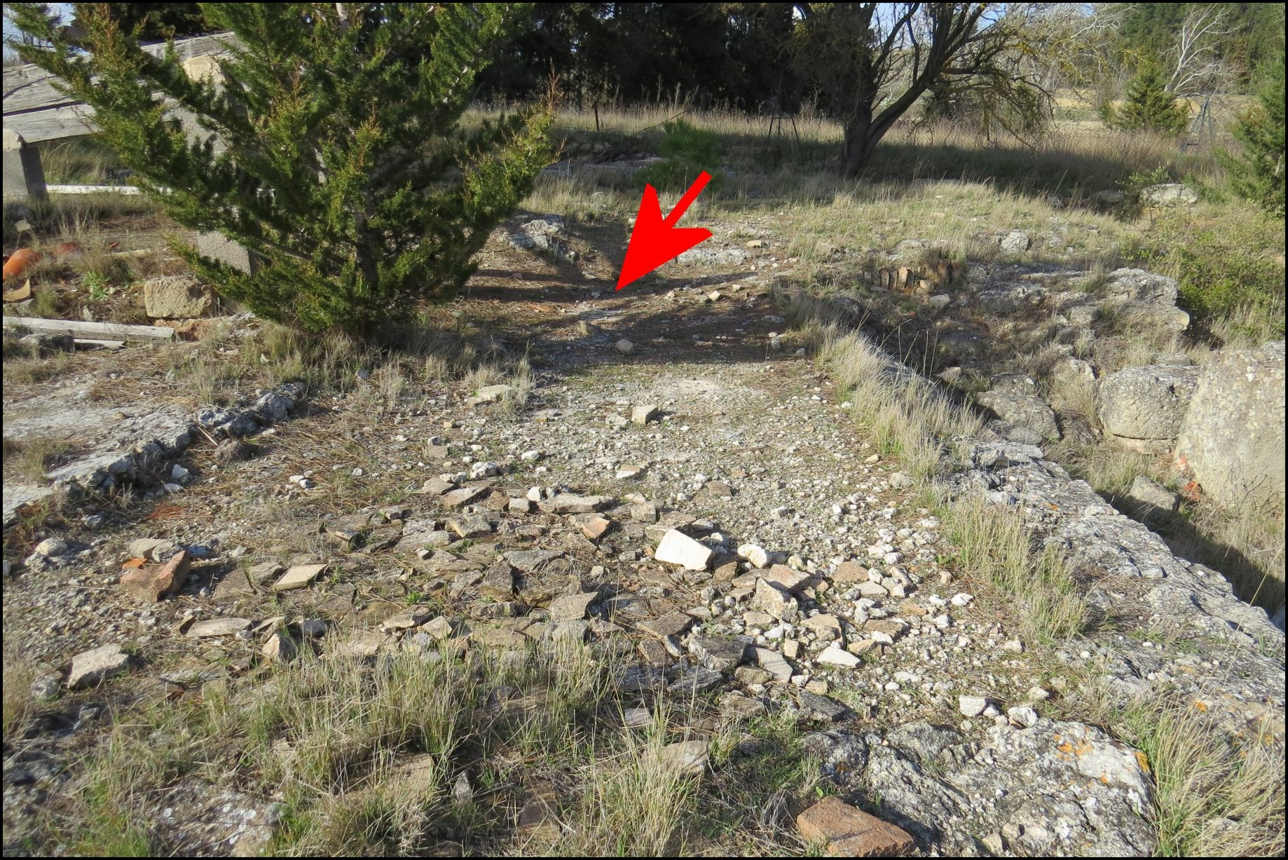 Piscine B ou "chaude", vue du sud. Villa romaine de Vivios, Lespignan, Occitanie. Flèche : emplacement de la canalisation (pièce "10") l'ayant alimentée par le trop plein de la piscine A ou "froide", plus au nord.